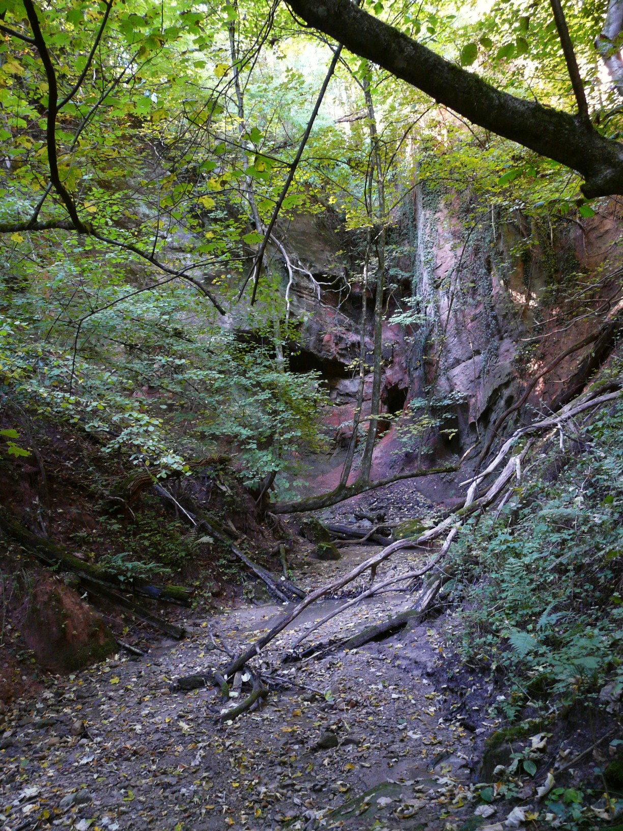 Akvofalo Gillenbach, Treviro, Germanio.